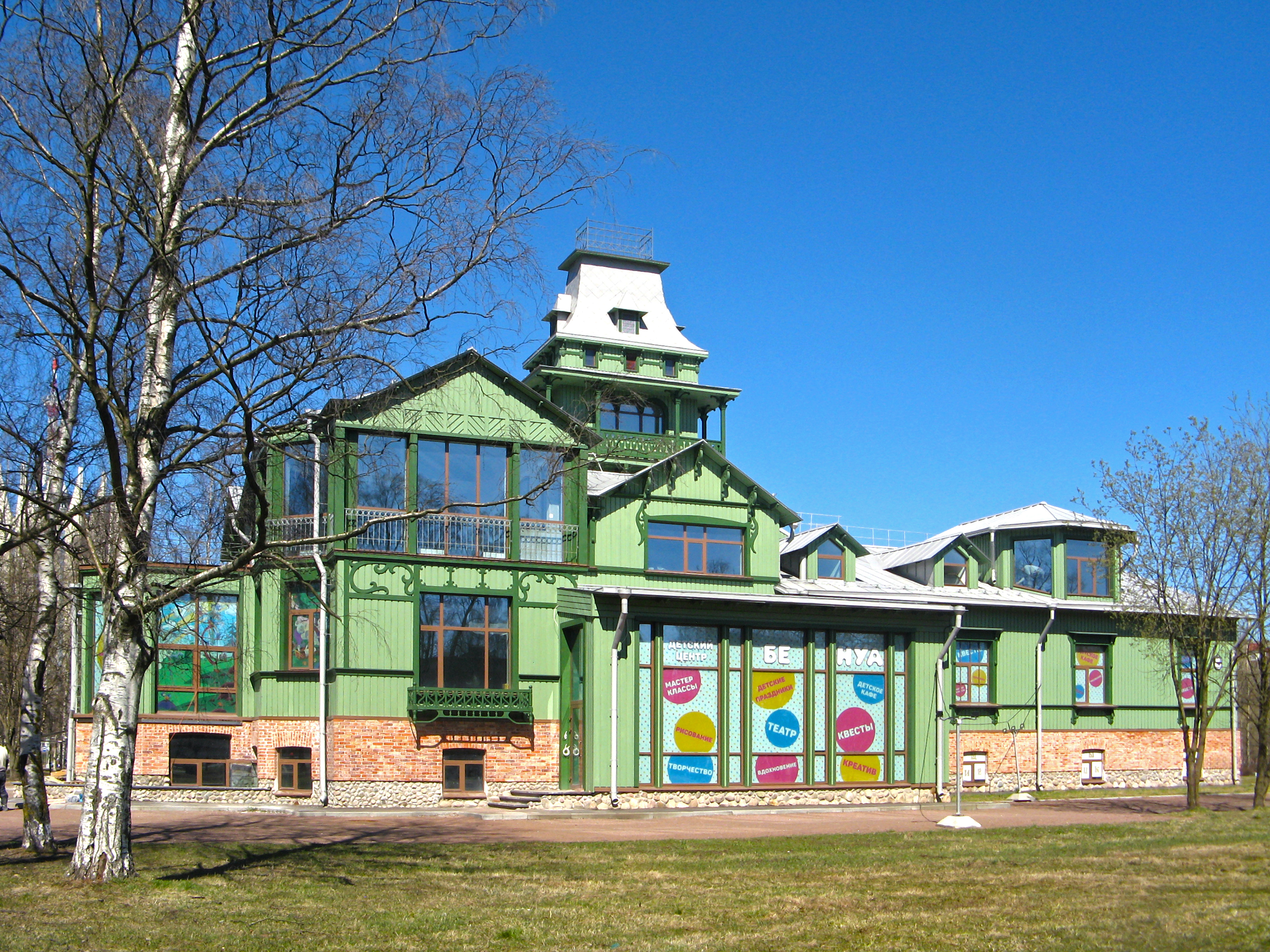 Парк Сосновка - истоки Муринского ручья (парк Сосновка, сад Бенуа и долина Муринского ручья): парк Сосновка, ограниченный проспектами Северным, Луначарского, Светлановским, Тореза, а также улицей Есенина; сад Бенуа на углу Тихорецкого и Светлановского проспектов; Муринский ручей на участке от Муринской дороги до улицы Руставели. Муринский парк не включен, ru-spb, Выборгский район, Санкт-Петербург This image is related to the protected area of Russia number 7810020